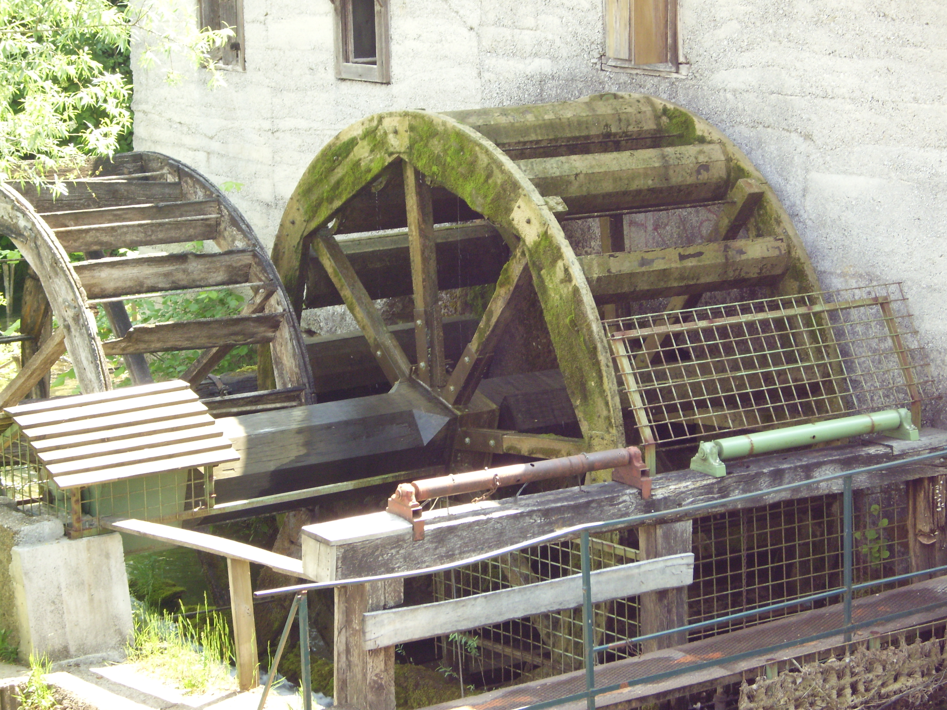 Mühlenkanal / Mühlenrad in Mreznica